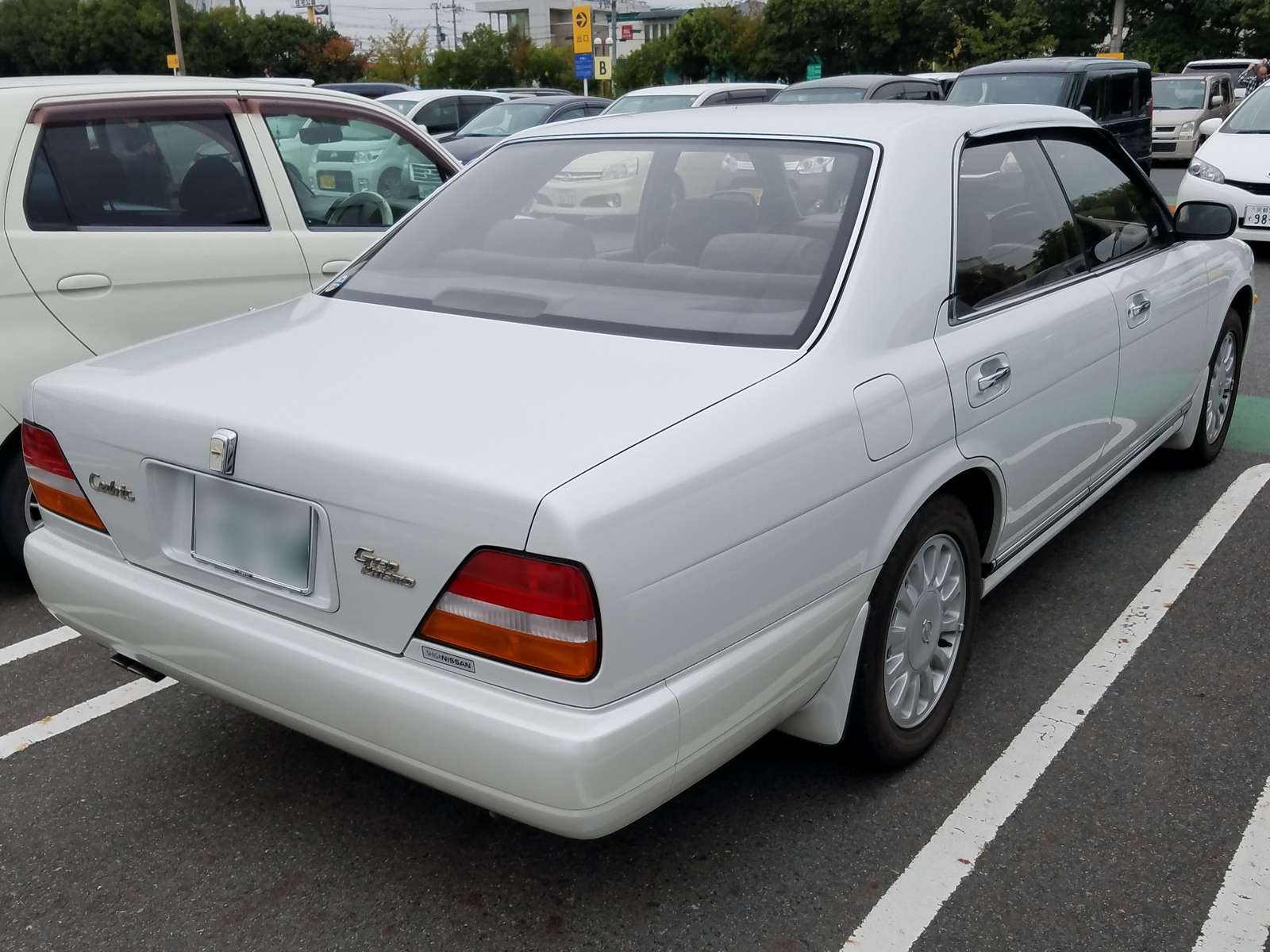 セドリック 4ドアハードトップ グランツーリスモ（後期型）